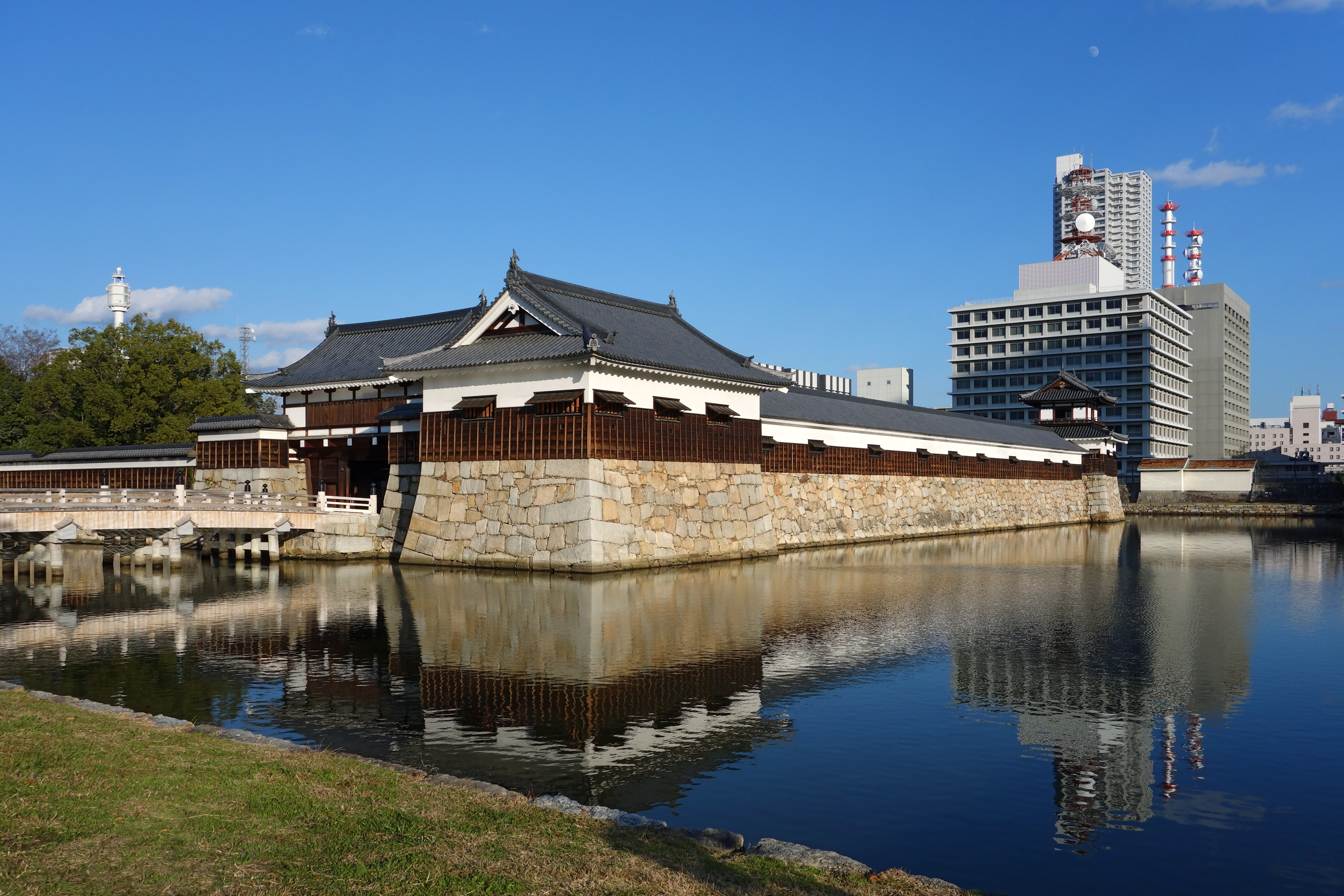 Hiroshima Castle (広島城), Hiroshima, Hiroshima prefecture, Japan